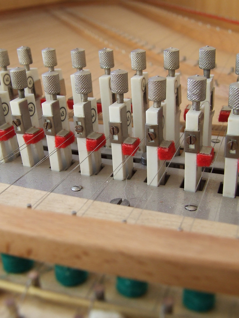 Gros plan sur registres et sautereaux de clavecin Lindholm